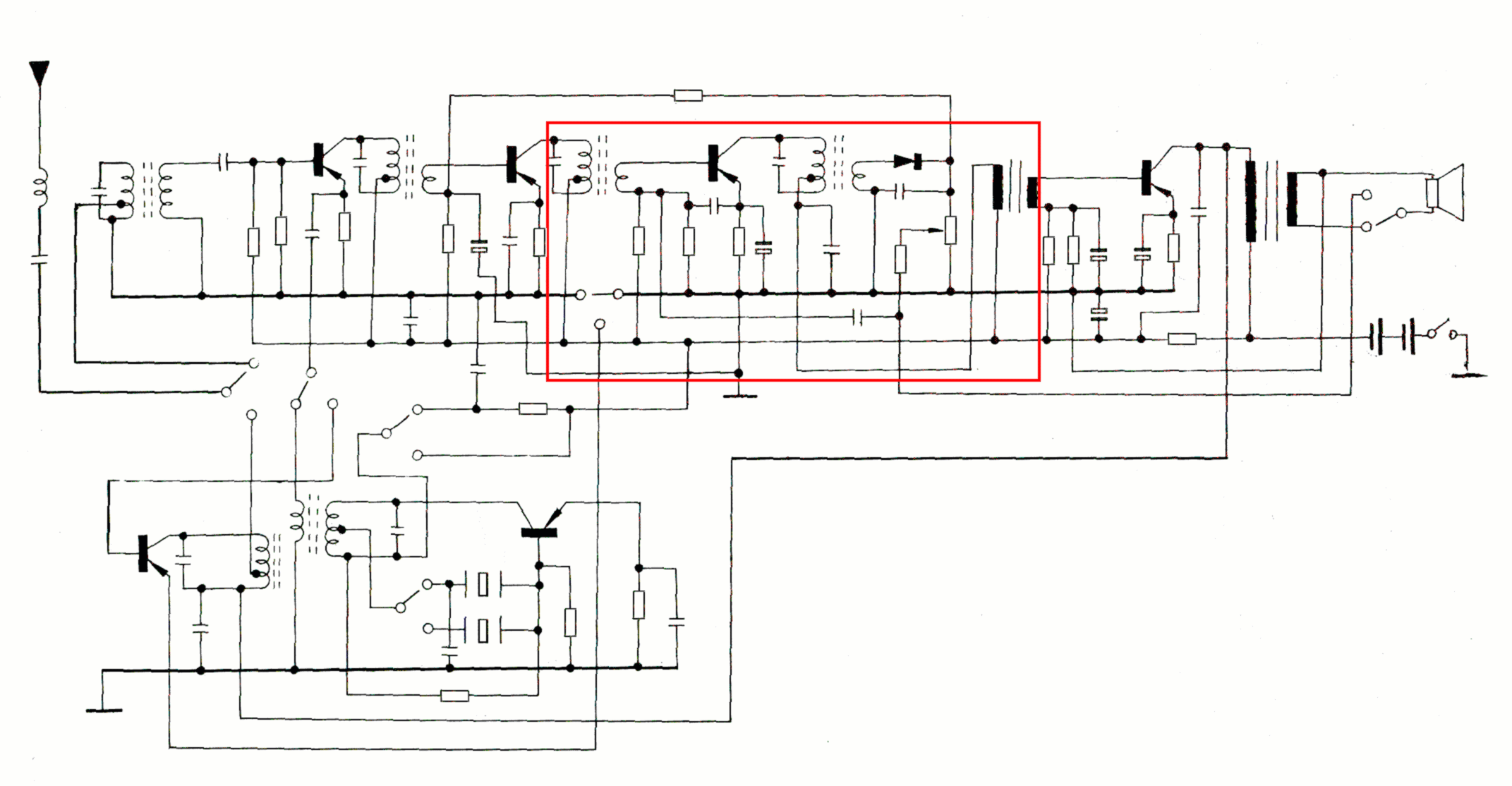 Funkgeräteschaltung